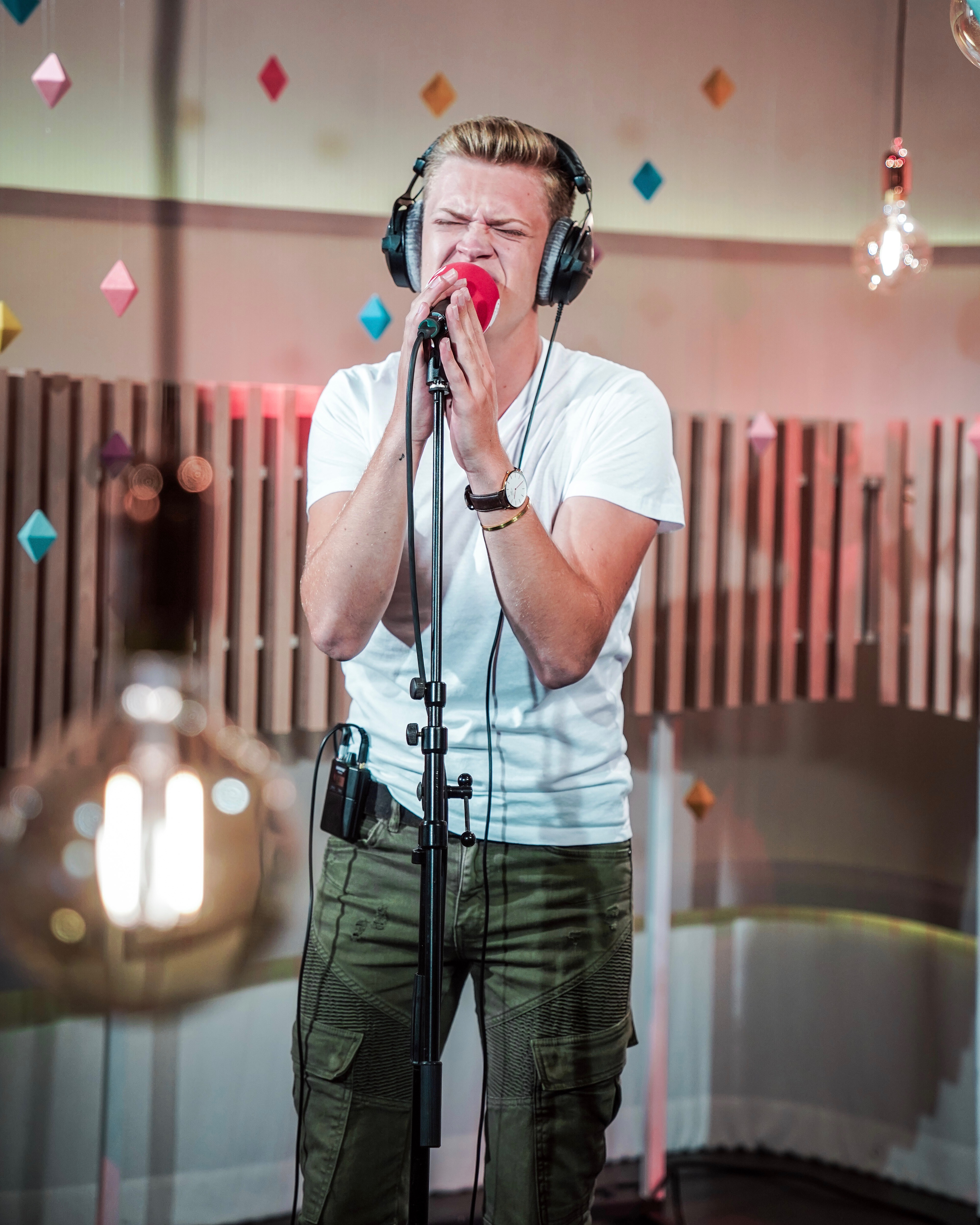 Jérémie live te gast bij Radio2 voor een live-optreden van zijn single 'Alleen Bij Jou'